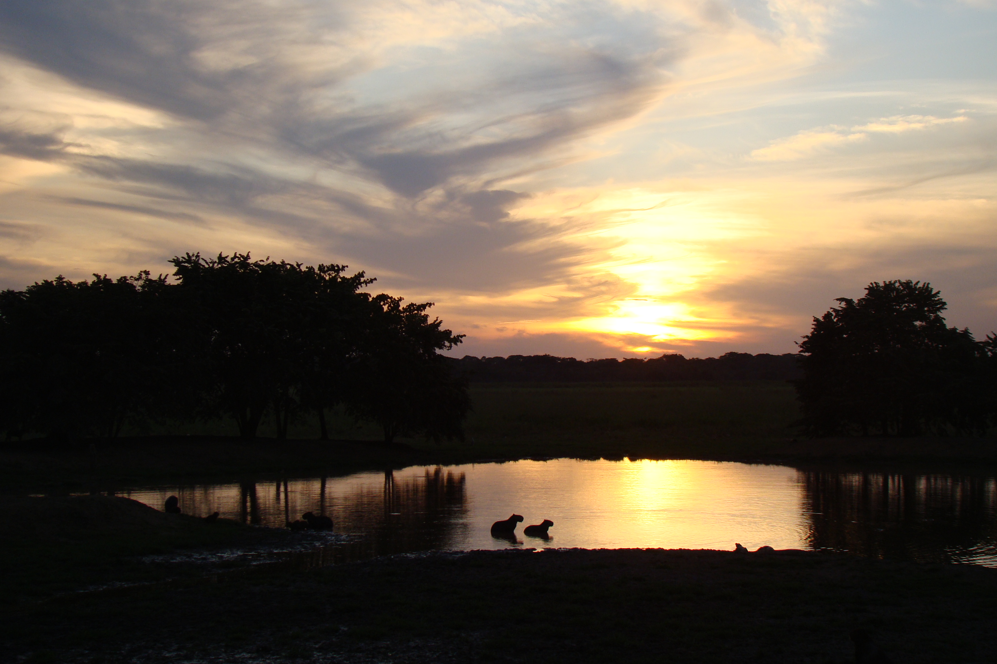 Atardecer en Hato Piñero